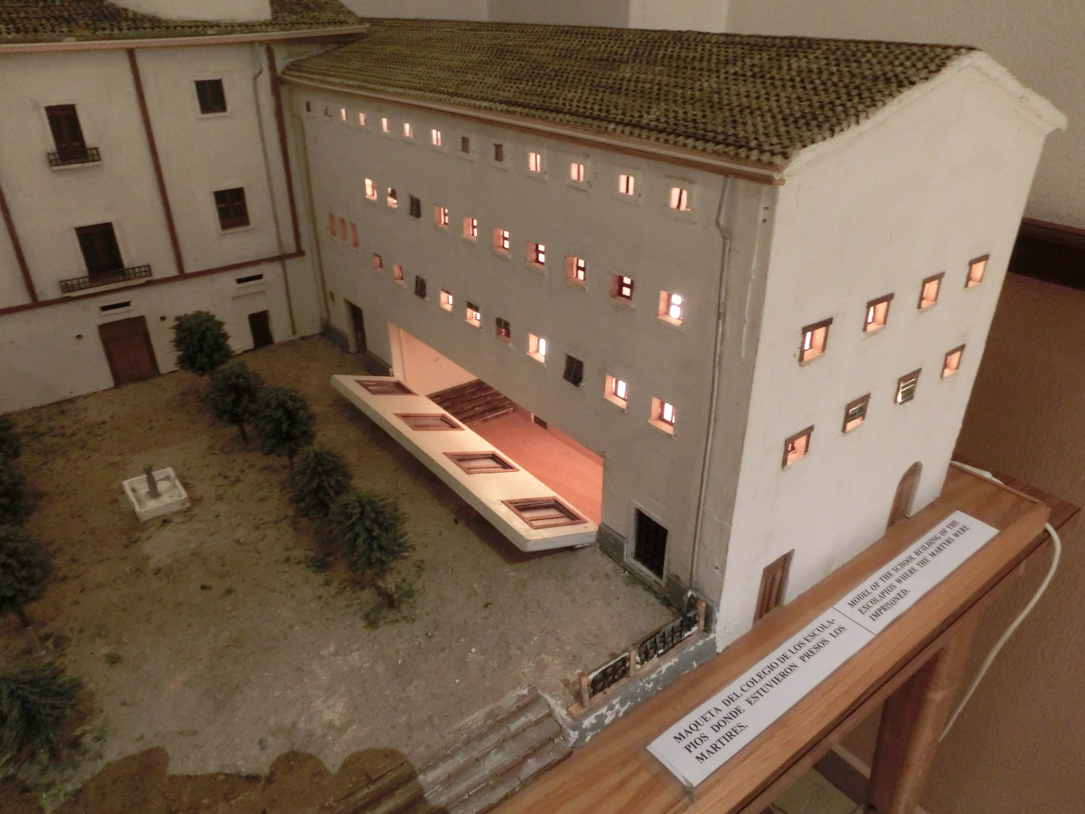 Plastico dell'edificio del collegio degli scolopi di Barbastro. Nell'immagine è visibile il salone degli atti accademici che venne usato come prigione di fortuna per i seminartisti clarettiani che vennero martirizzati nel mese di agosto del 1936, durante la guerra civile spagnola. La riproduzione è visibile nel museo dei martiri clarettiani a Barbastro, (Huesca) in Spagna.